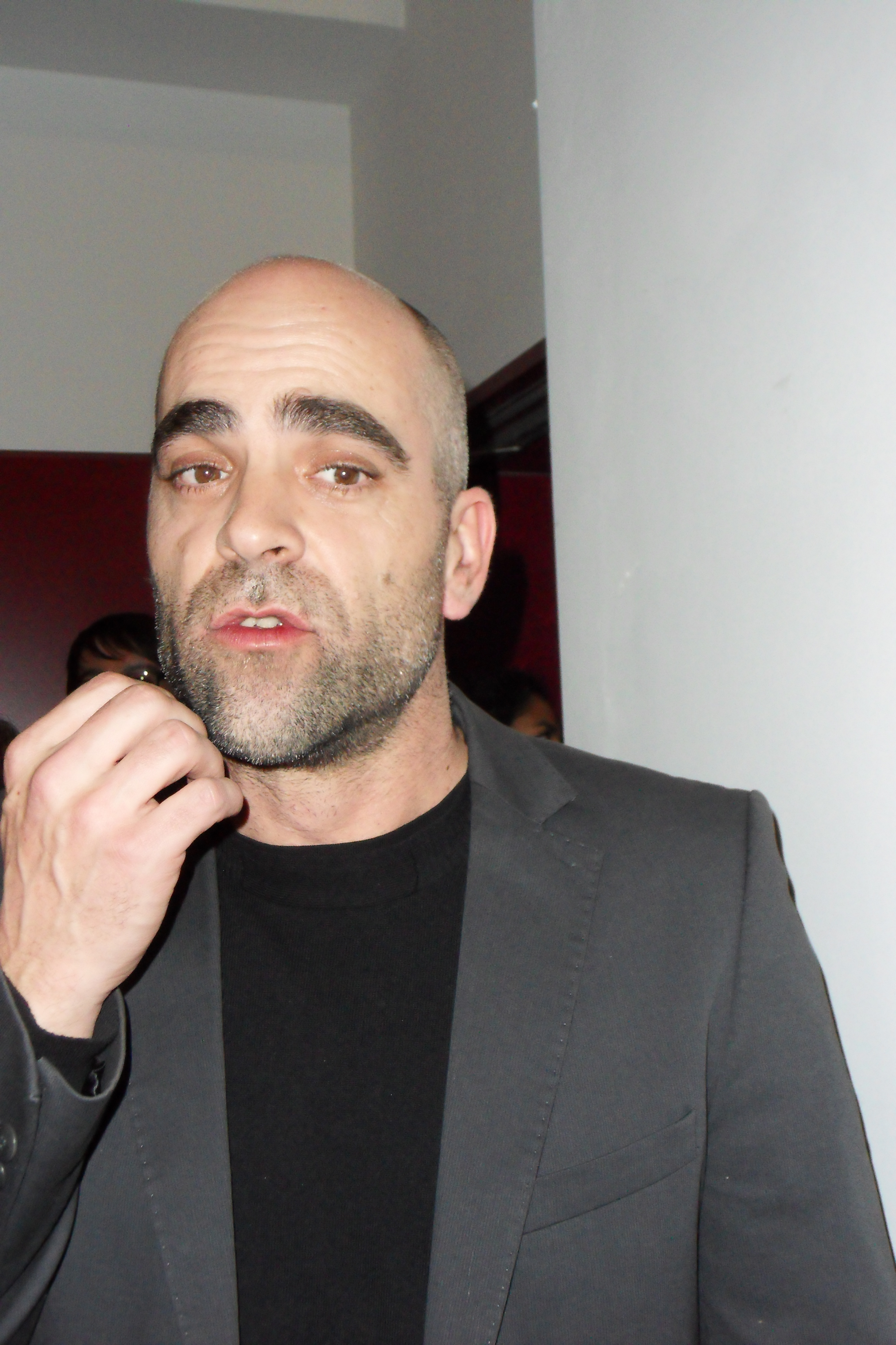 Luis Tosar nach der Aufführung von "También la lluvia" auf der 61. Berlinale am 15. Februar 2011.